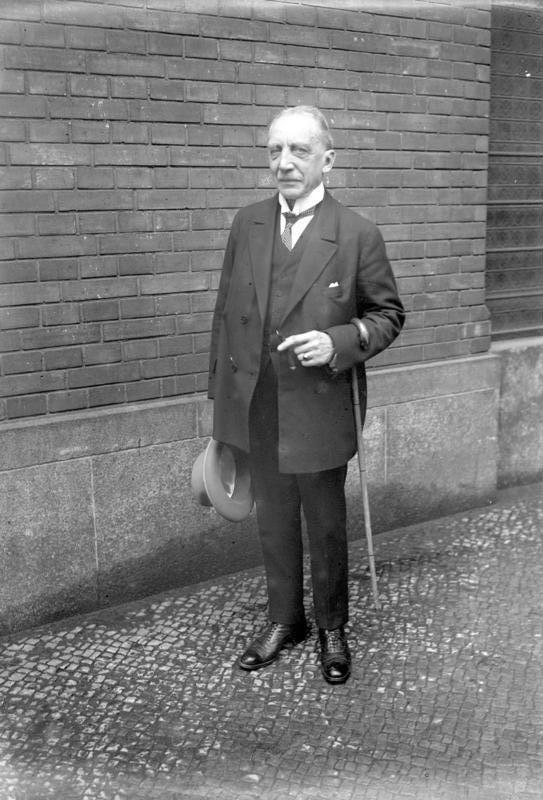 Minister a.D. von Loebell, der ehemalige preussische Innenminister und Nachkriegs-Oberpräsient von Brandenburg ist im Alter von 76 Jahren gestorben! Loebell leitete als Präsident des Reichsbürgerrates die Wahl Hindenburgs zum Reichspräsidenten erfolgreich. Eine der letzten Aufnahmen des Ministers a.D. von Lebell